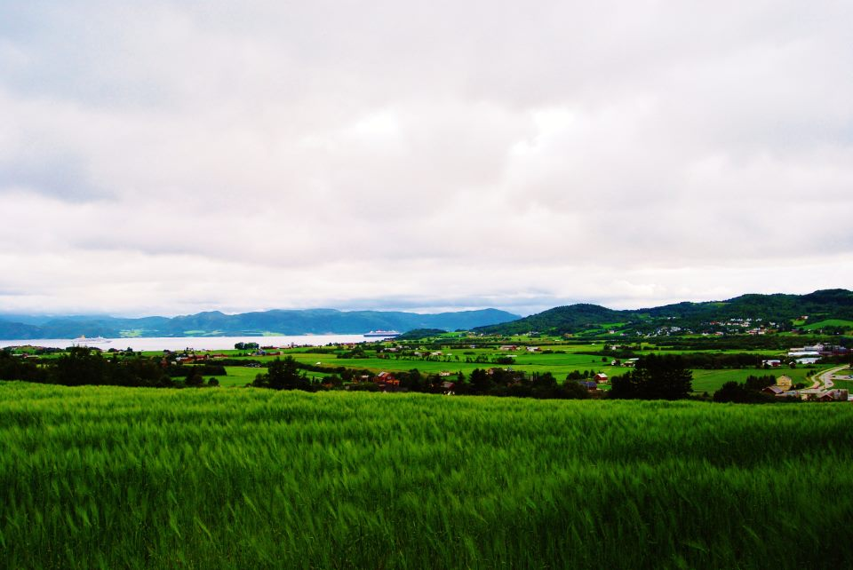 Stadsbygd i Rissa sett fra Hårsaker